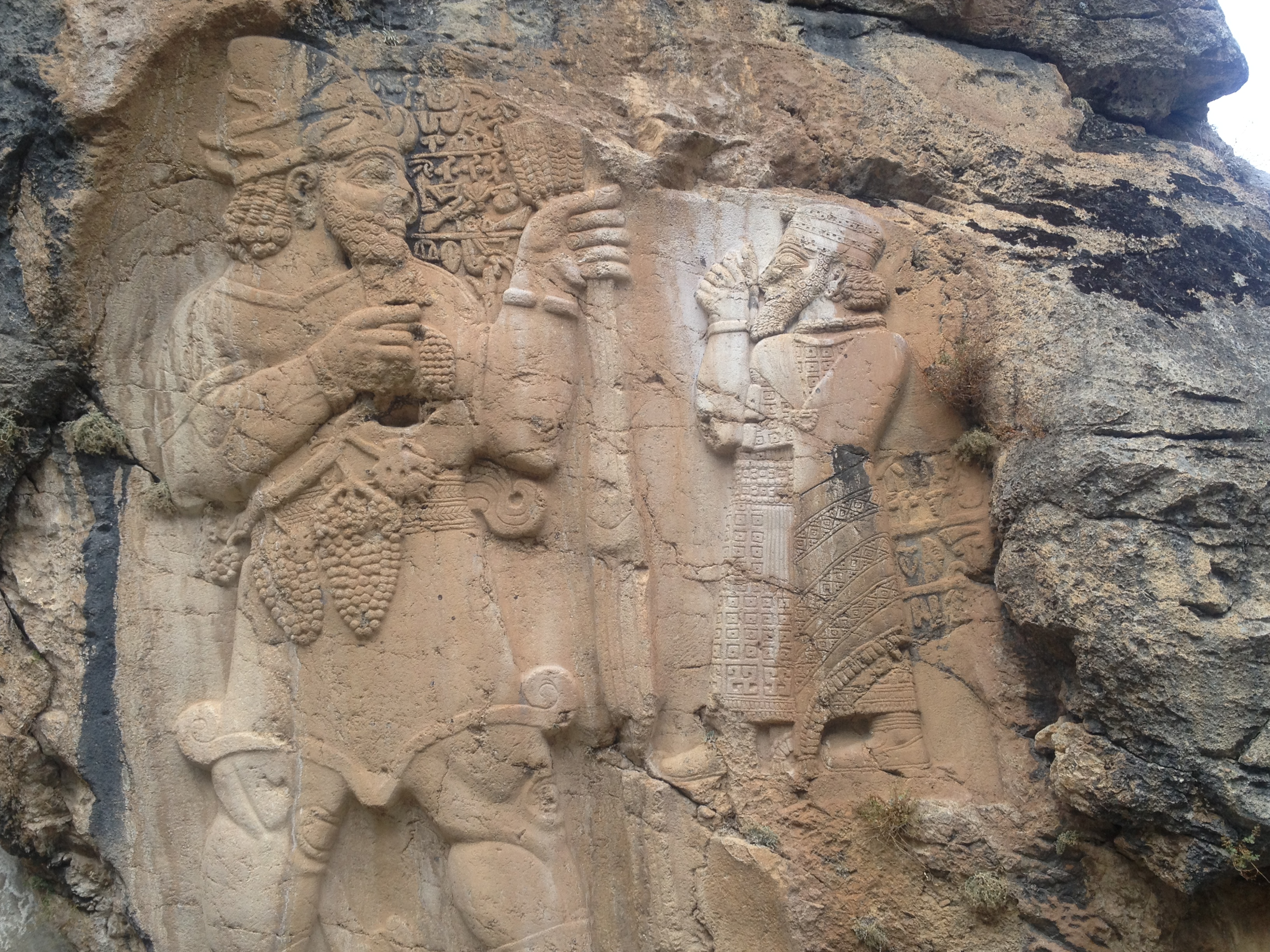 Aydınkent, 42980 Aydınkent/Halkapınar/Konya, Turkey